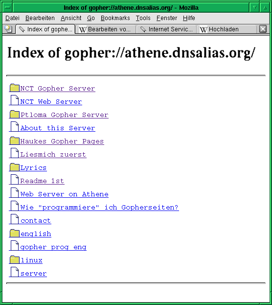 Gophermenue mit Mozilla